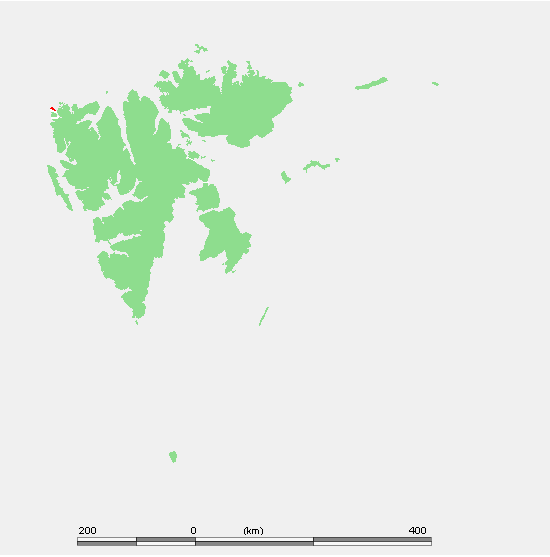 Svalbard Islands - Russia - Spitsbergen - Amsterdam.PNG